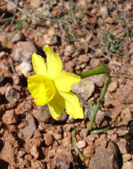 Narcissus assoanus (narcisse à feuilles de jonc, narcisse d'Asso) Photo prise à Castelnou le 1er avril 2005 par Jean Tosti 2005